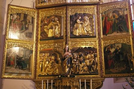 Marienaltar von Leonhard Astl (spätgotisch). Der Altar entstand um 1510/20 in der Werkstatt von Leonhard Astl und ist einer der bedeutendsten und aufwändigsten spätgotischen Flügelaltäre Oberösterreichs. Halb geöffnet: Nur Außenflügel geöffnet. Davor gestellt: Marienstatue